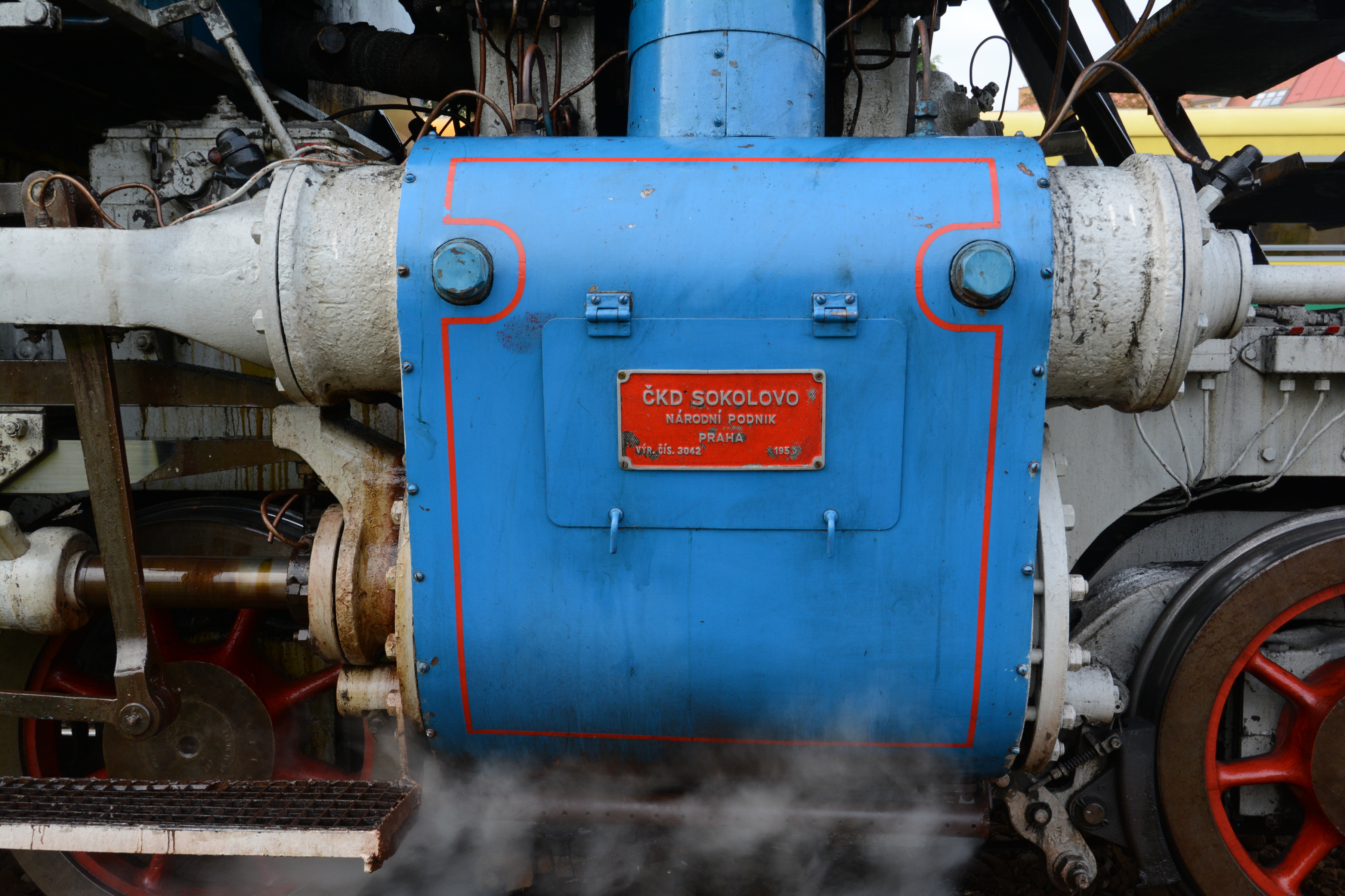 Lokomotiva 477.043 na nádraží Praha - Dejvice.